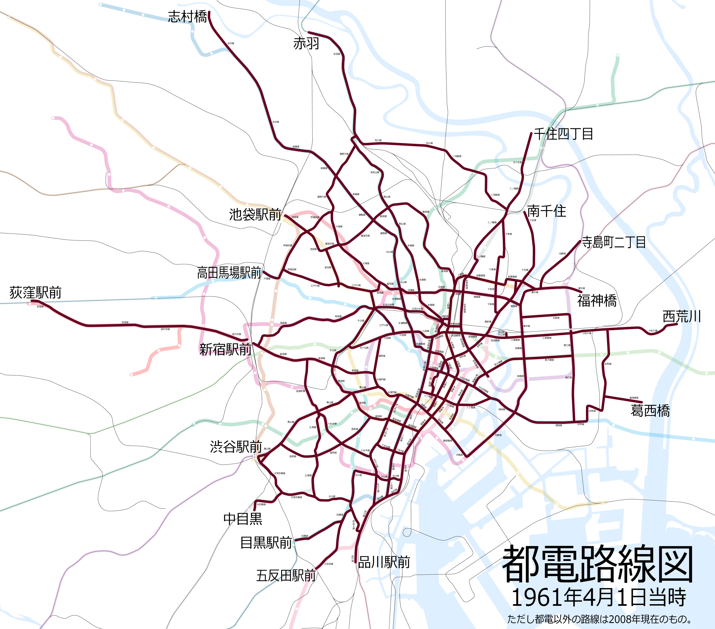 1961年4月当時の都電路線図。（都電以外の路線は2008年現在のもの）